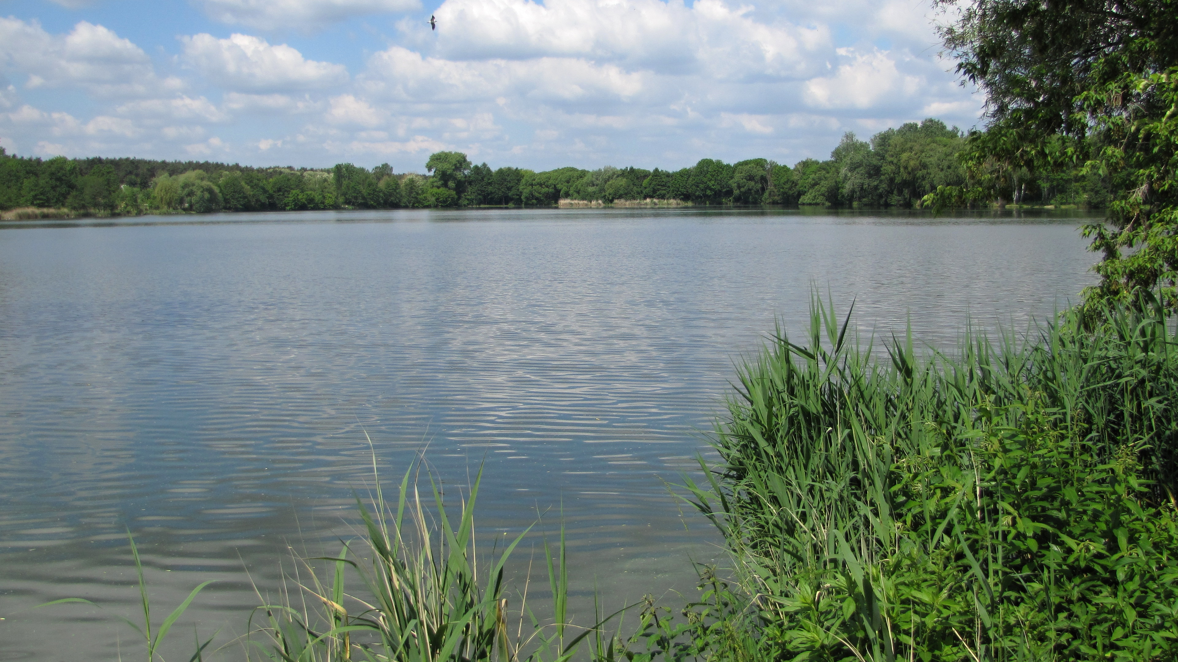 Rybník ve Vracově